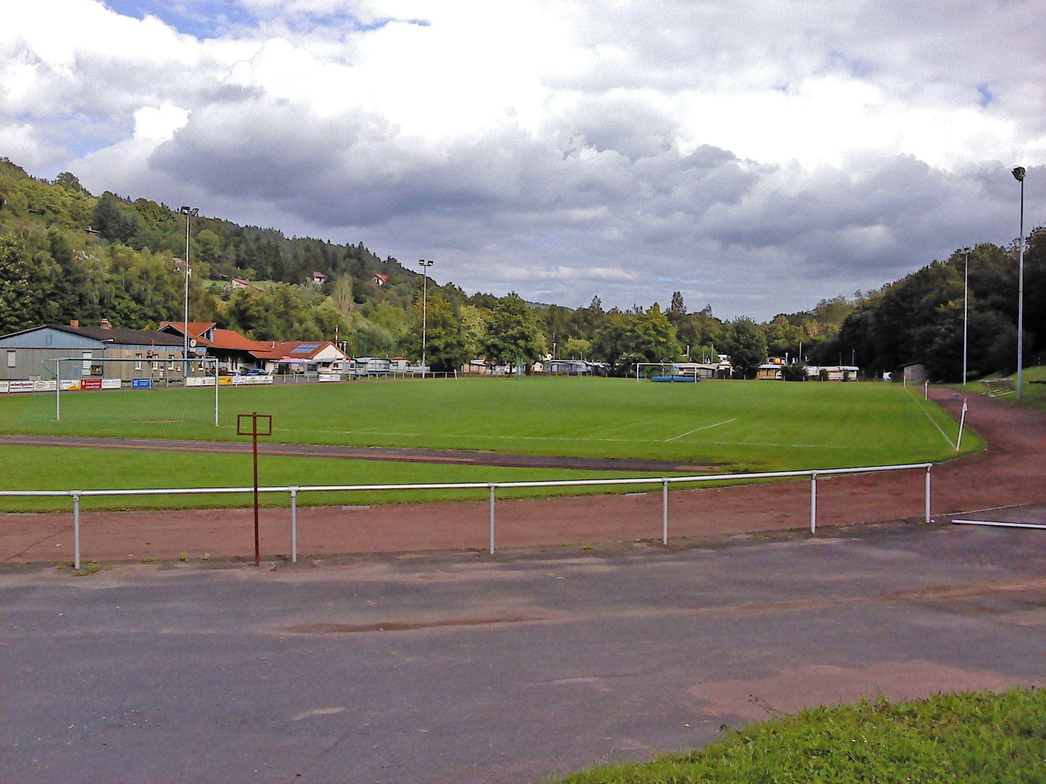 Der Liebenbachsportplatz am Ortsausgang von Spangenberg.